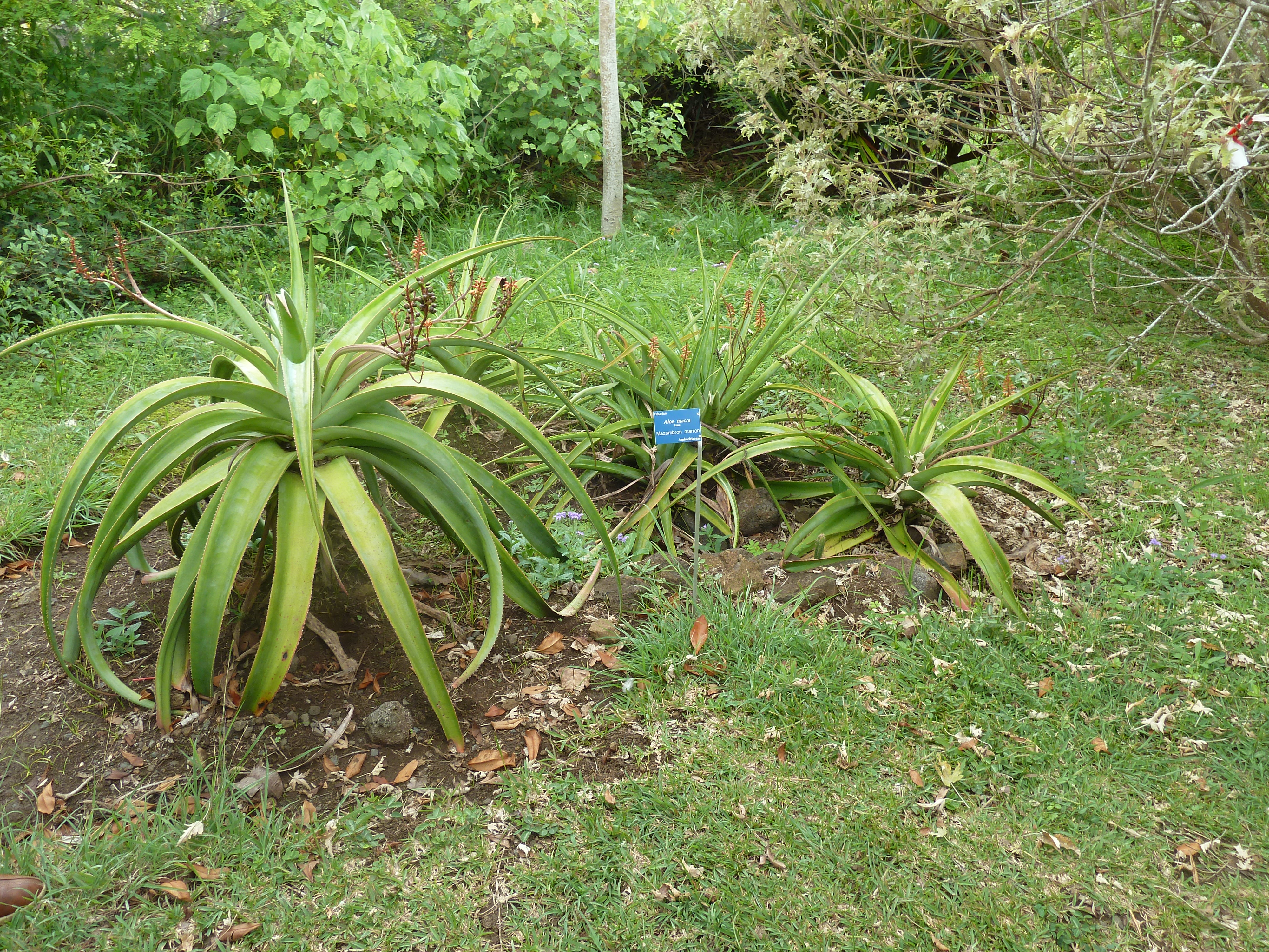 Mazambron Marron